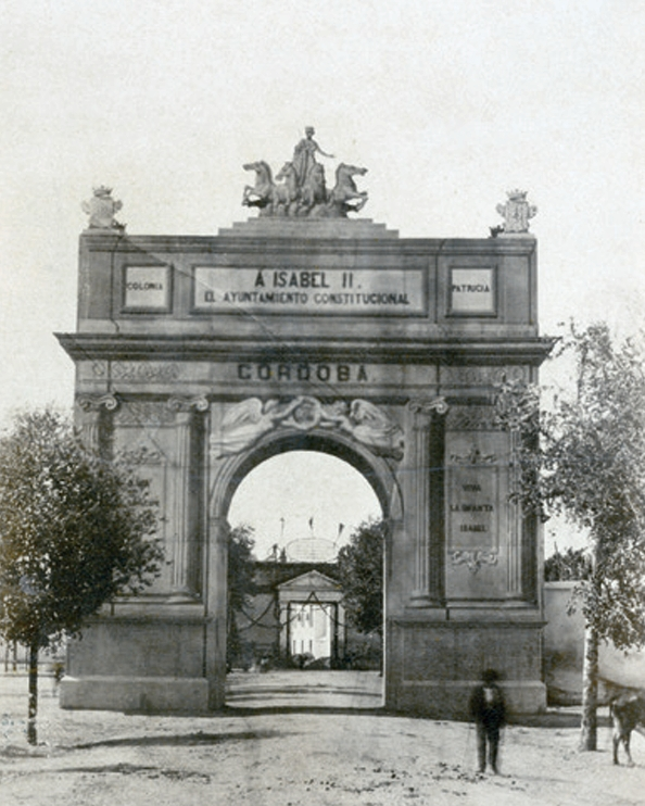 Imagen del antiguo Arco de Isabel II, hoy desaparecido, construido para conmemorar la visita de dicha reina a la ciudad de Córdoba (España).